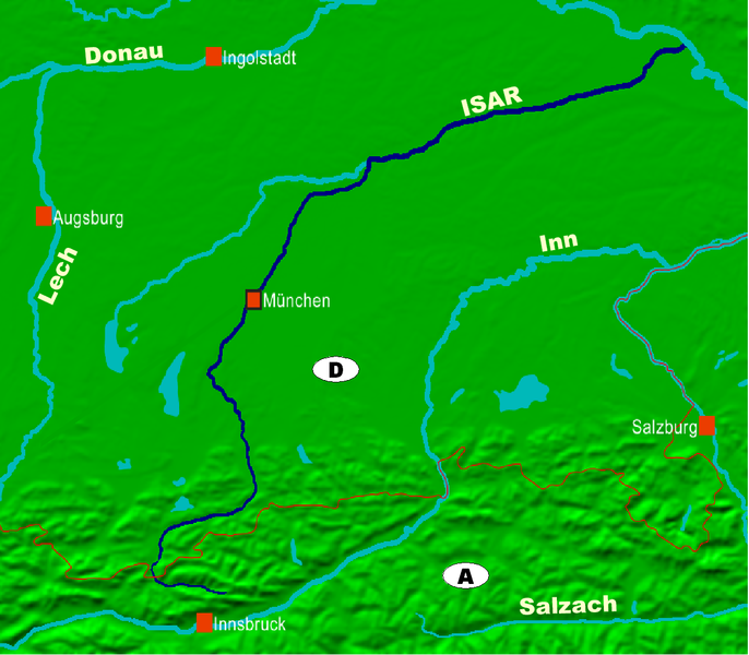 Isar